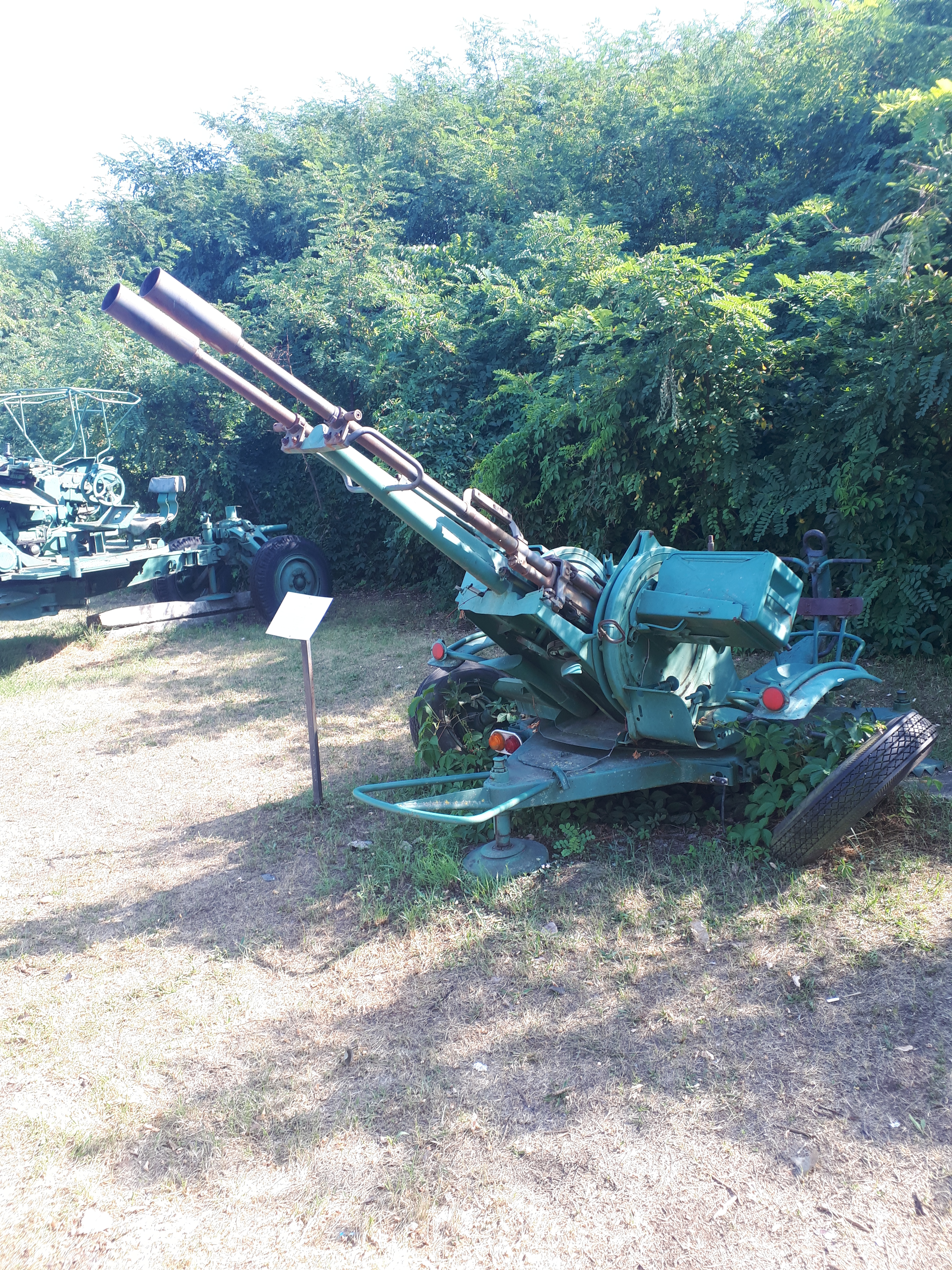 A gépágyú a Komáromi Monostori Erőd udvarán van kiállítva